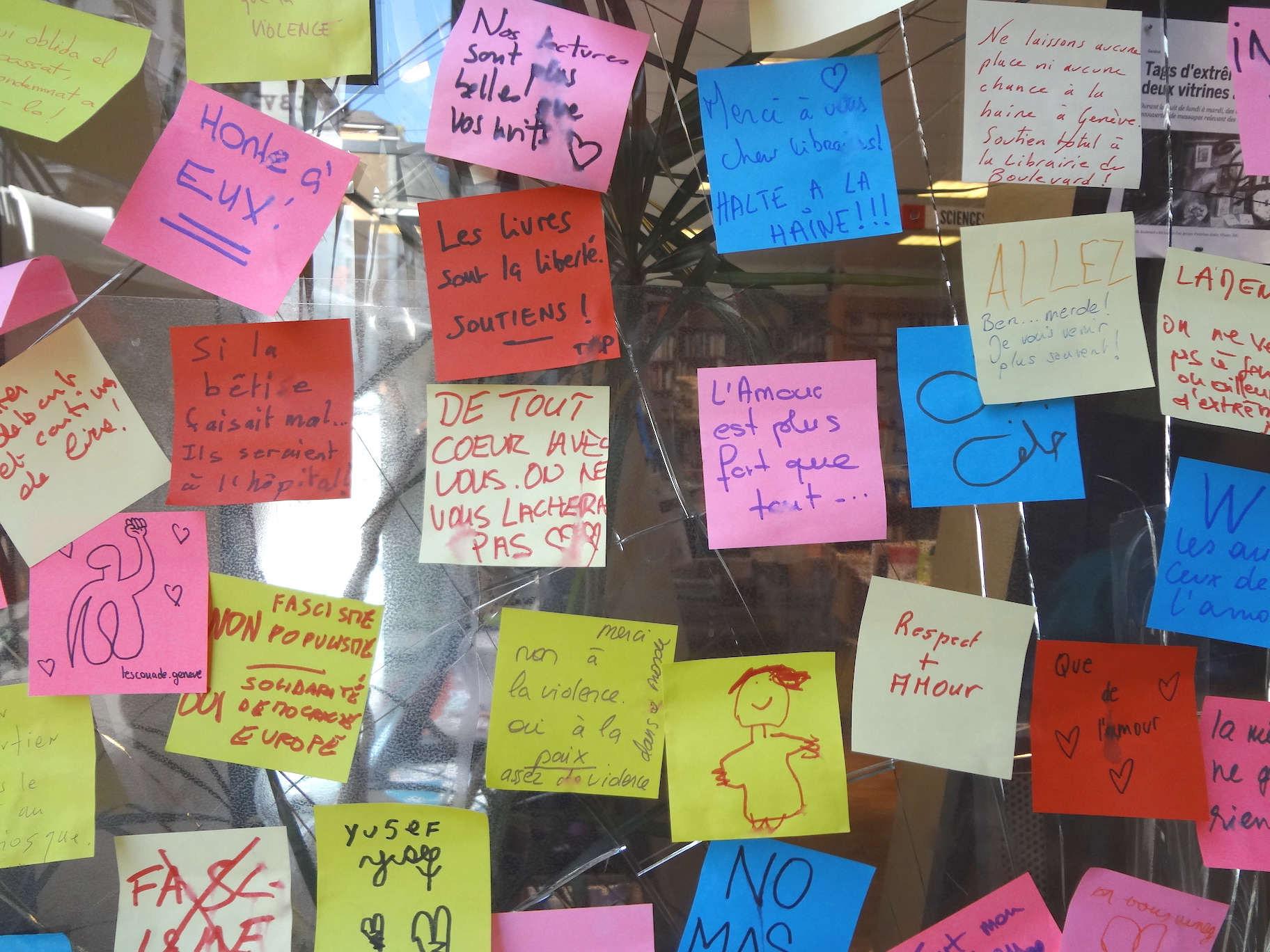 Messages de soutien à la suite d'une agression par un groupuscule genevois d’extrême-droite, dans la nuit du 15 au 16 octobre 2018 : la grille d’une bouche d’égout a été lancée contre l’une des vitrines de la librairie, consacrée à des livres antifascistes.